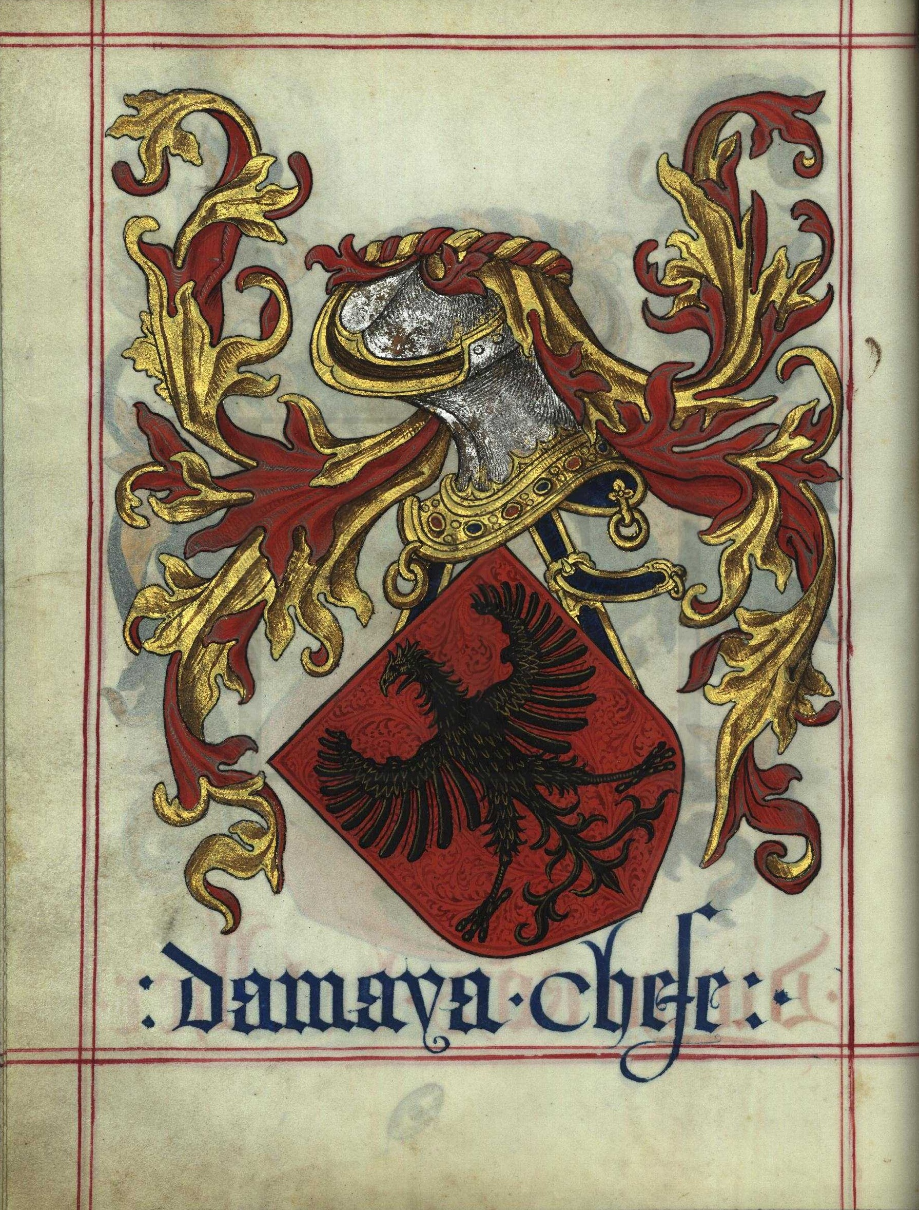 Livro do Armeiro-Mor, Maia (fl 100v)